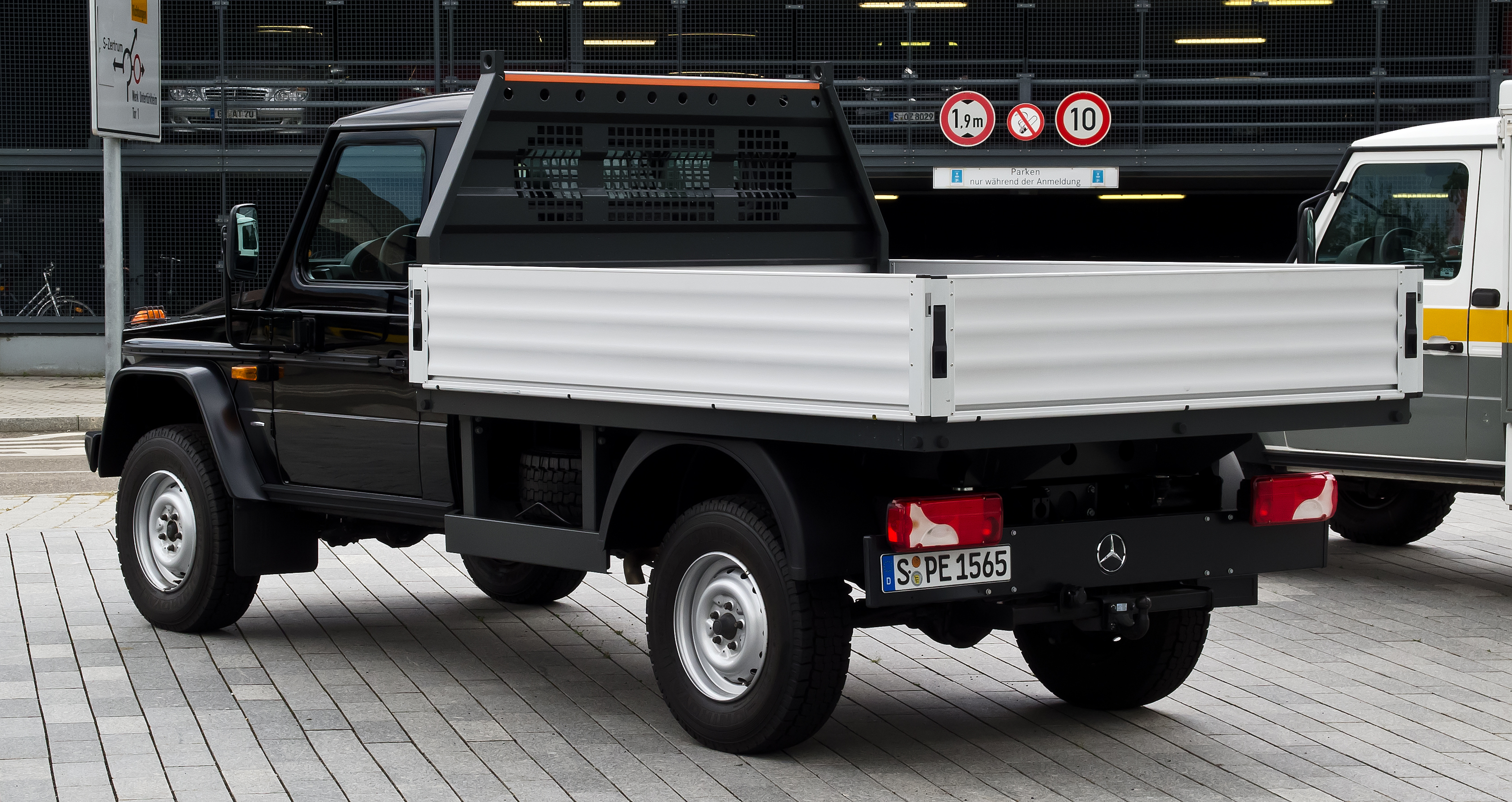 Mercedes-Benz G 300 CDI Professional Pritsche (W 461)